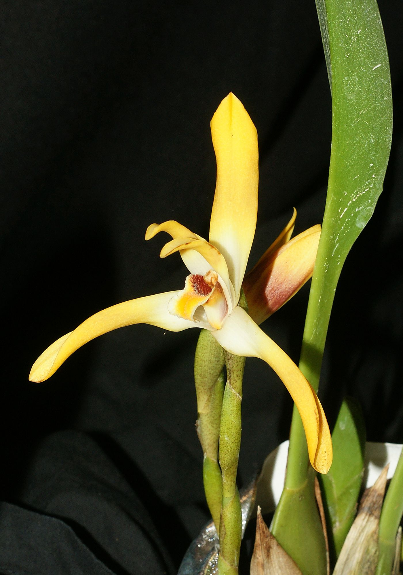 Maxillaria luteoalba